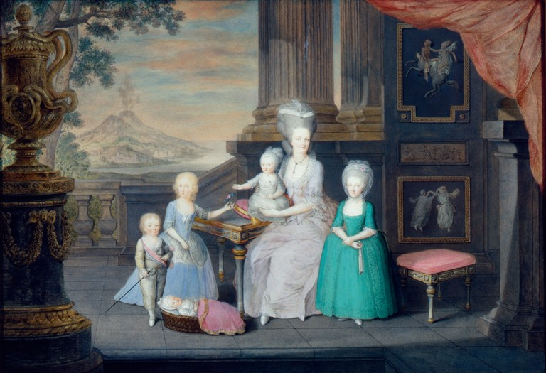 Königin Maria Karoline von Neapel-Sizilien mit fünf Kindern, 1777, Gouache; Bundesmobilienverwaltung